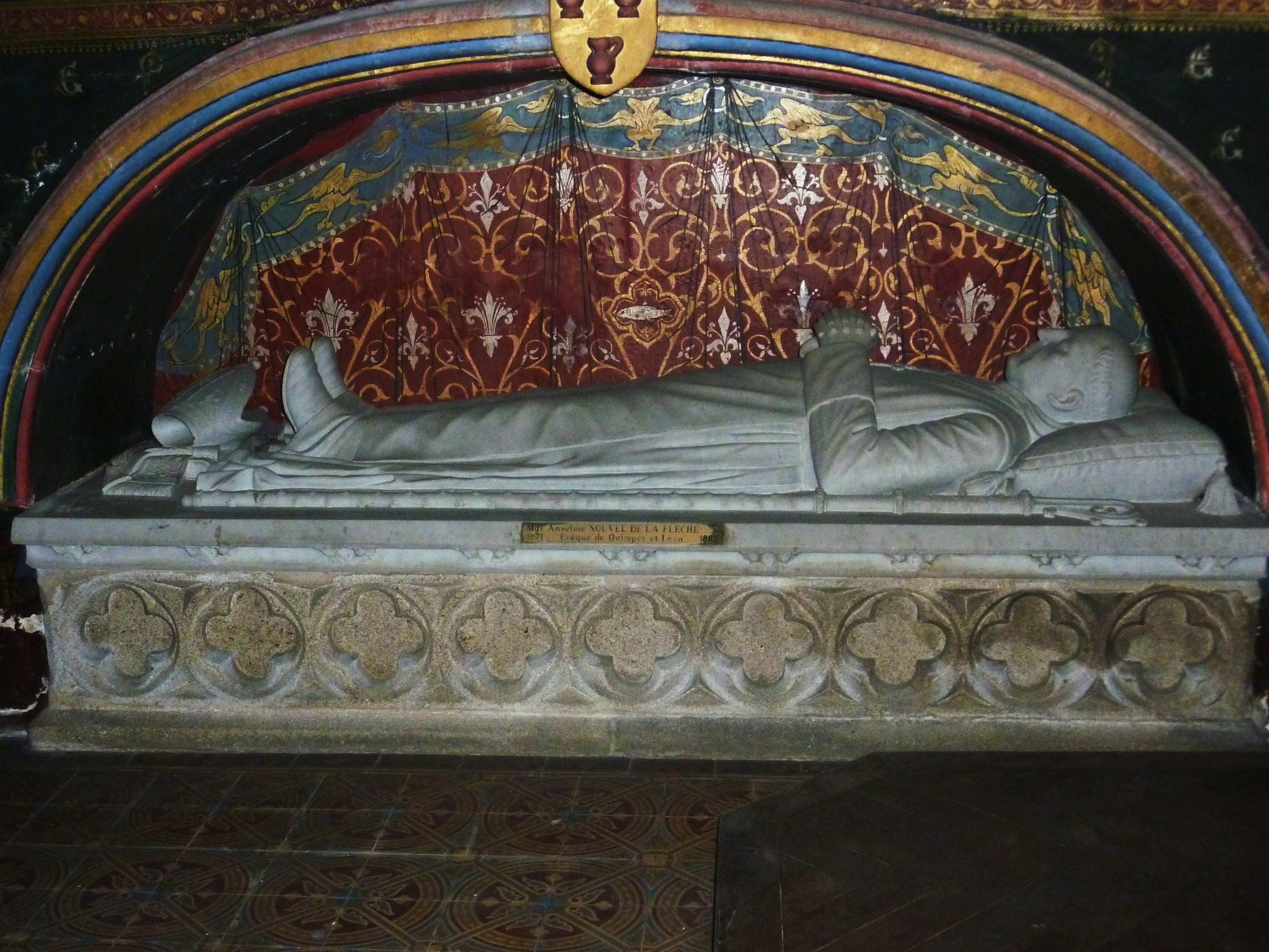 Cathédrale Saint-Corentin de Quimper : le tombeau de Mgr Anselme Nouvel de La Flèche, évêque de Quimper et du Léon entre 1872 et 1887